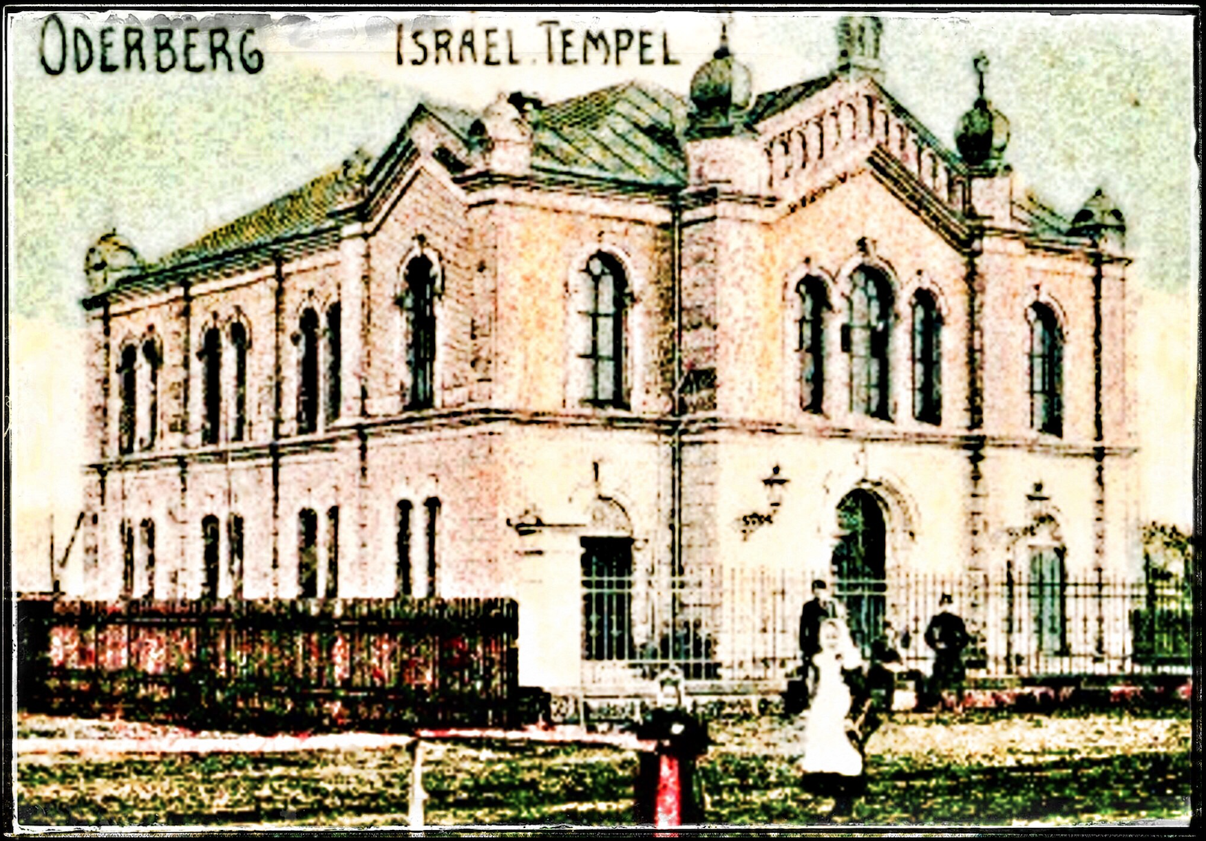 Synagoga v Bohumíně